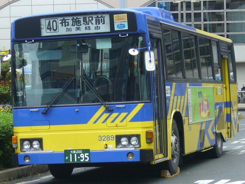 登録番号 大阪200か11-95 近鉄バス布施営業所所属 車番3289 20x06年5月20日 布施駅前にて撮影